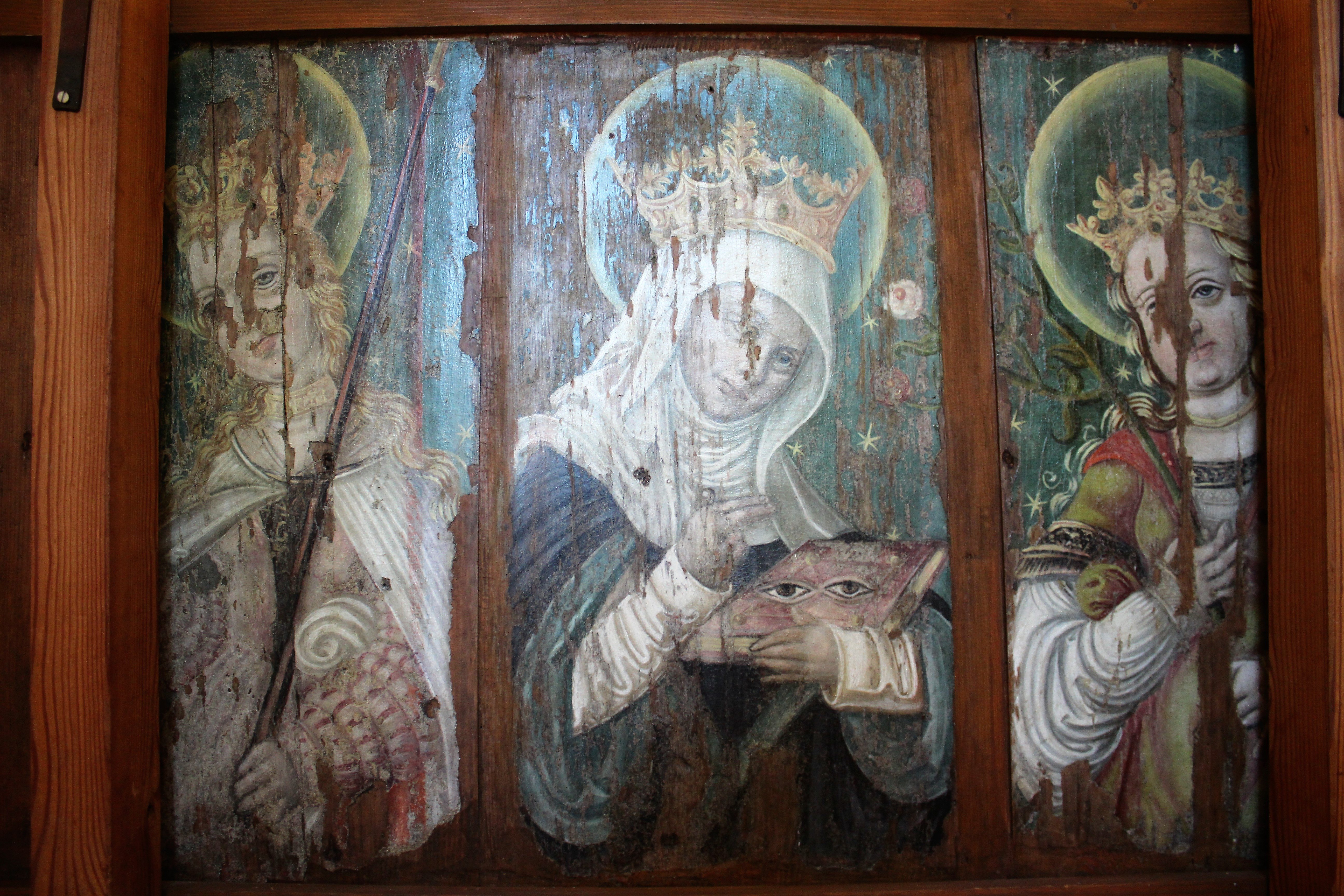 Evangelische Kirche St. Gotthardt, Rohnstedt, Großenehrich, Thüringen, Deutschland